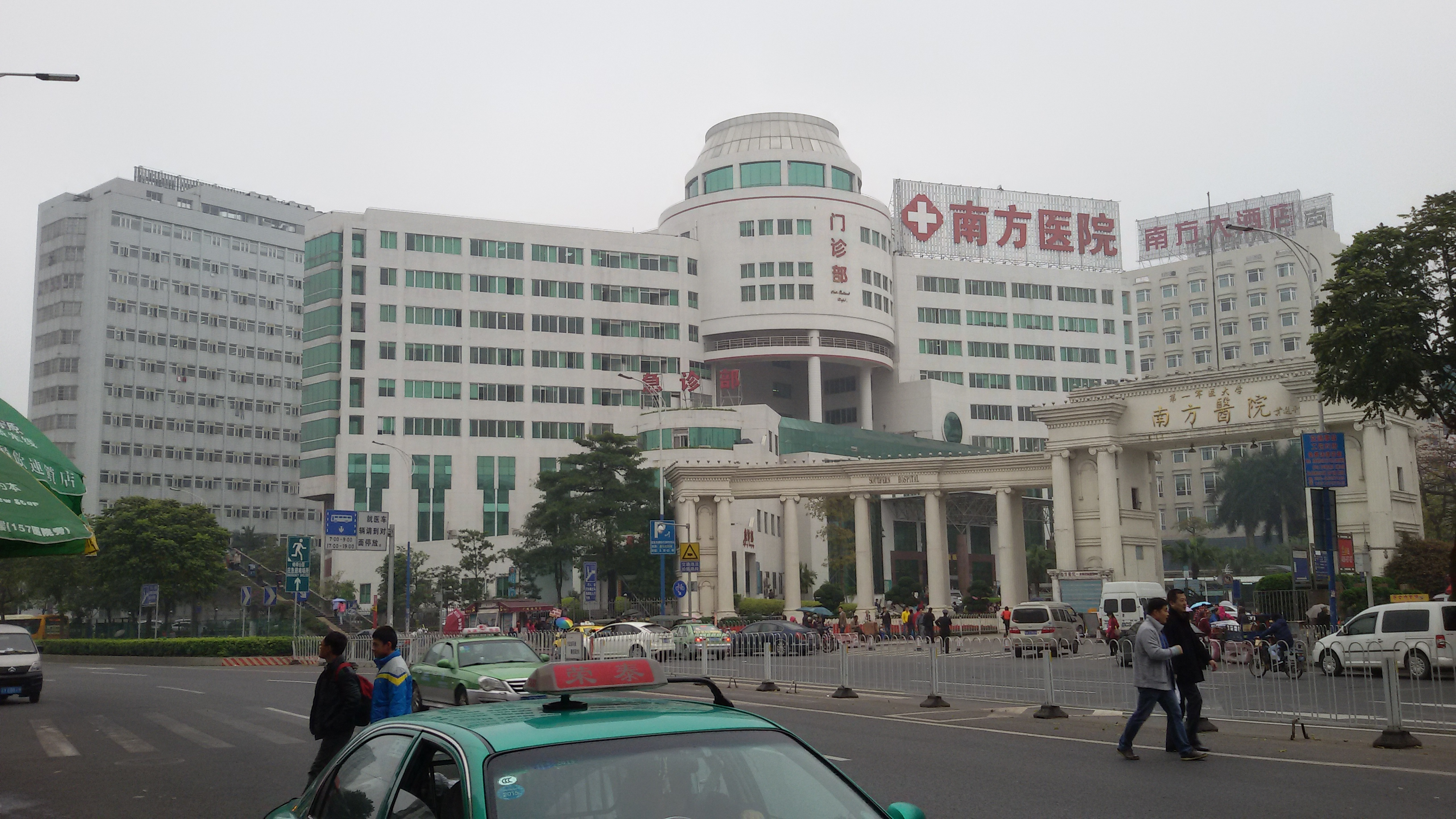 粵語: 南方醫院嘅成間大樓同牌坊